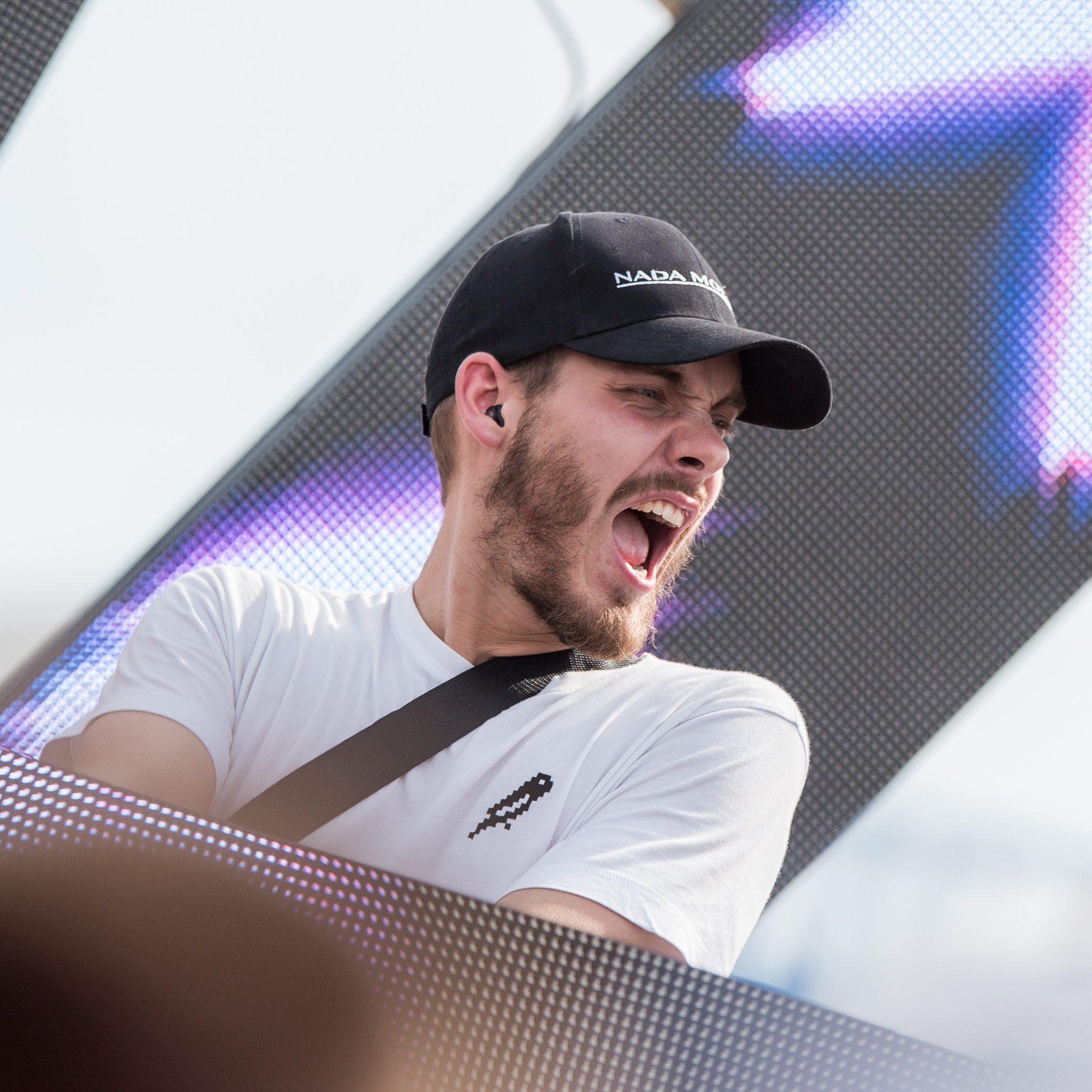 3rd Stage,Festival,Konzert,Livekonzert,Livemusik,Musik,Open Beatz 2016,San Holo,Sander van Dijck